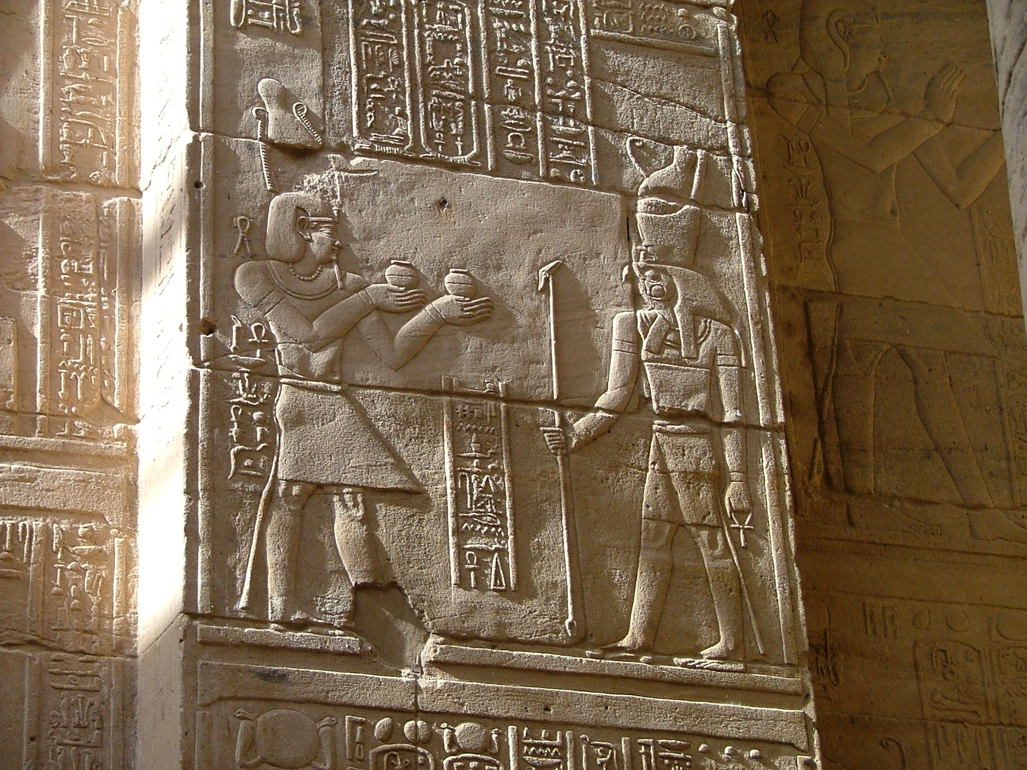 Temple d'Edfou. Scène d'offrande